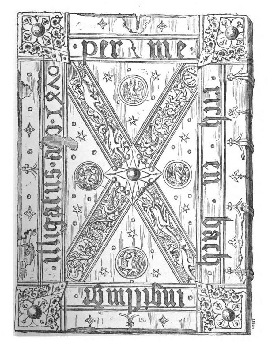 Zeichnung des Richenbach-Einbands einer Ausgabe von Augustinus:Confessiones